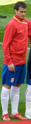 Danko Lazovic